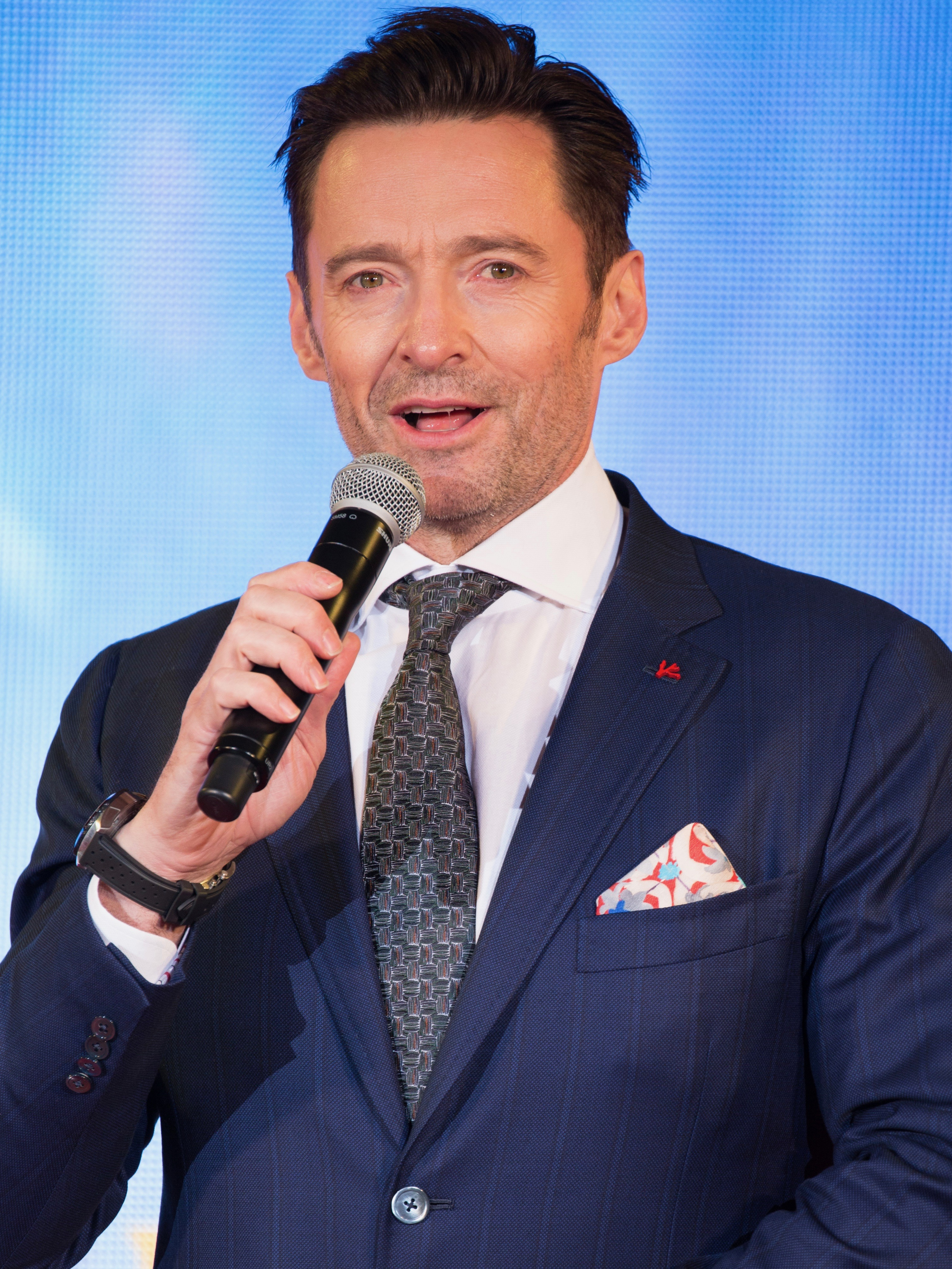 グレイテスト・ショーマン ジャパン・プレミア レッドカーペット ヒュー・ジャックマン